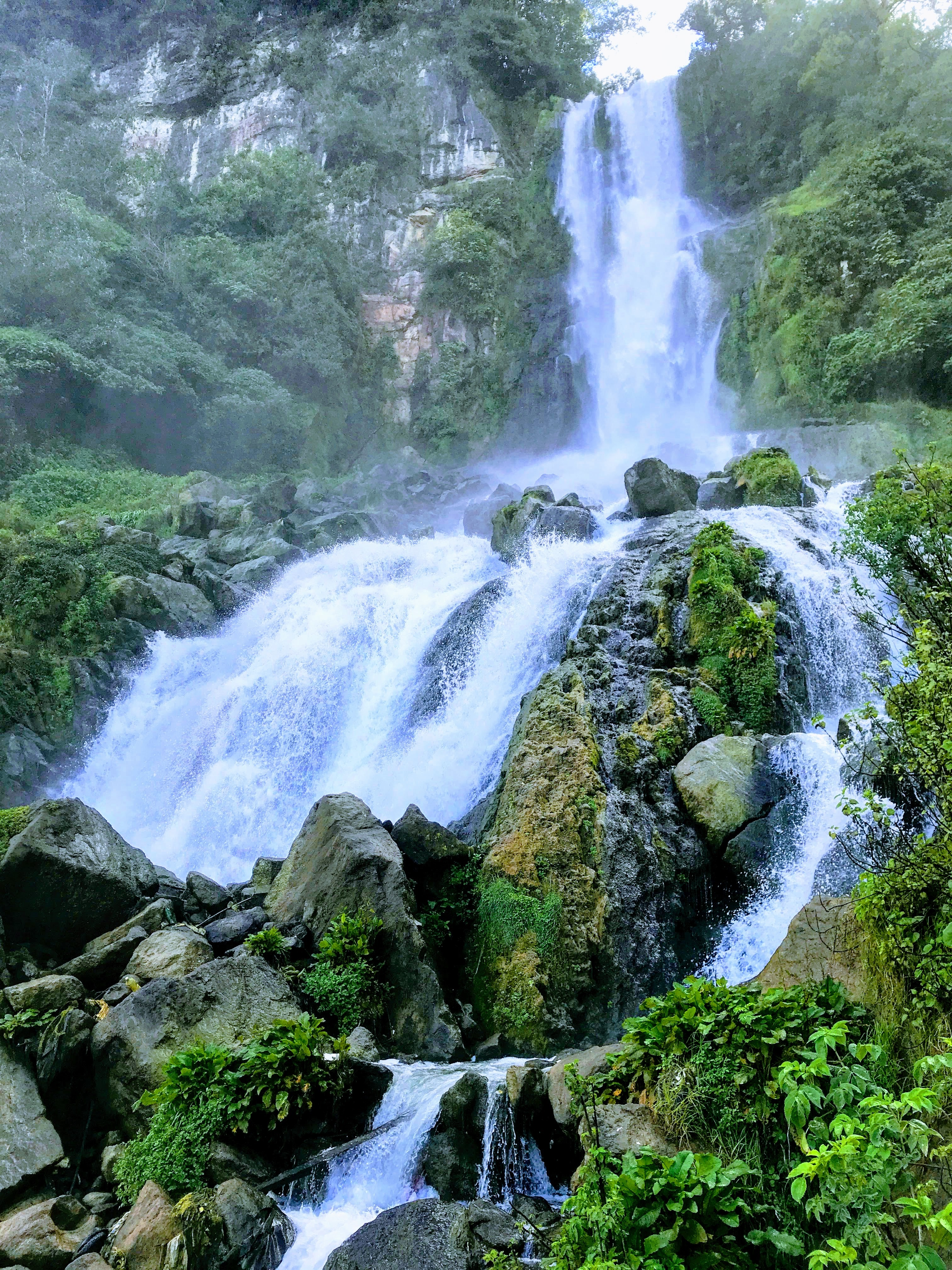 Ubicada en el municipio de San Pedro Soloma, al norte de Huehuetenango. Es considerada como una de las cataratas más altas de Guatemala con una altura aproximada de 100 metros.